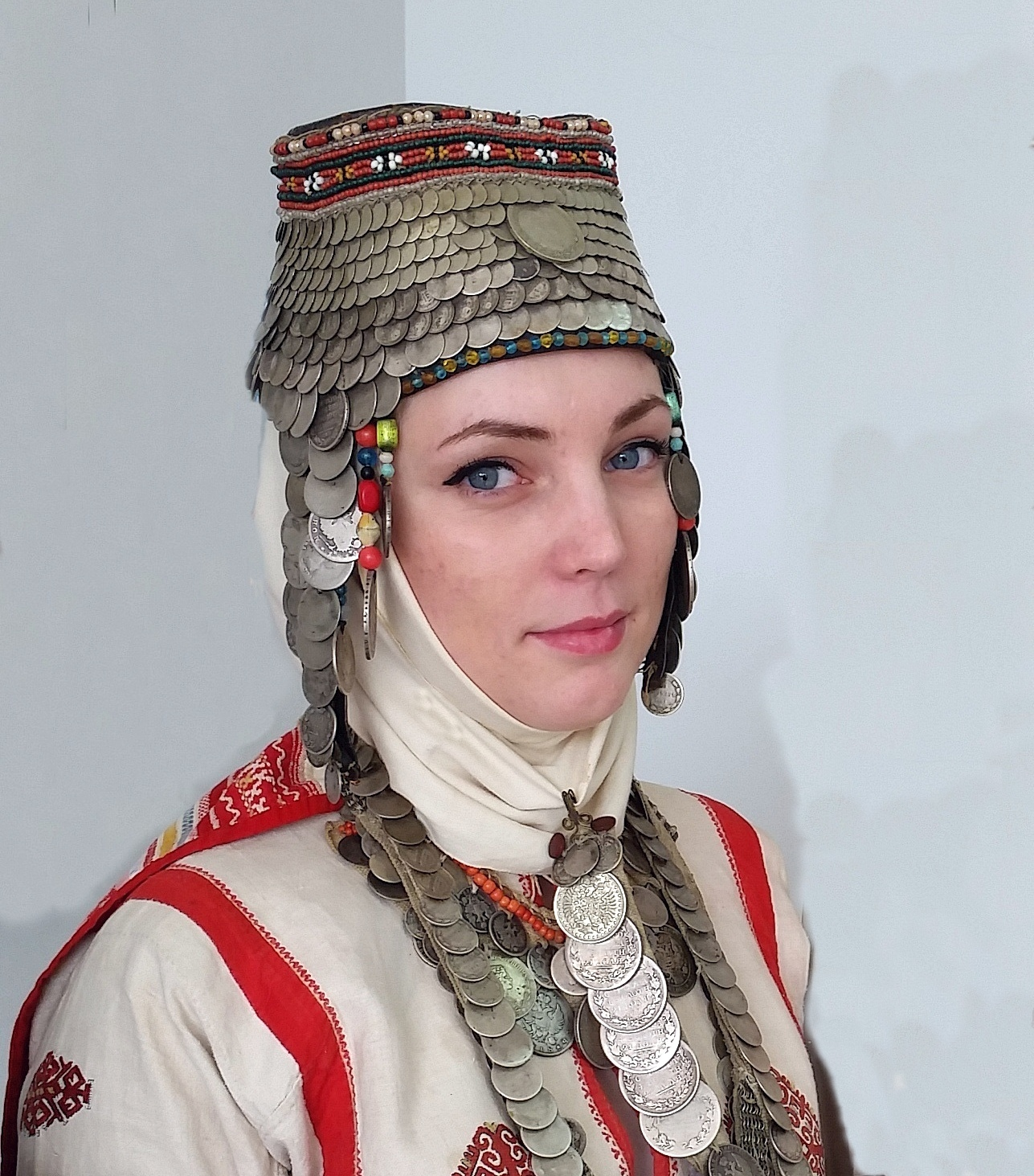 Традиционный головной убор (чув. хушпу) с кожаной основой цилиндрической формы, с бисерным шитьем и рядами серебряных монет. Носился замужними женщинами в составе праздничного, обрядового и выходного костюма.